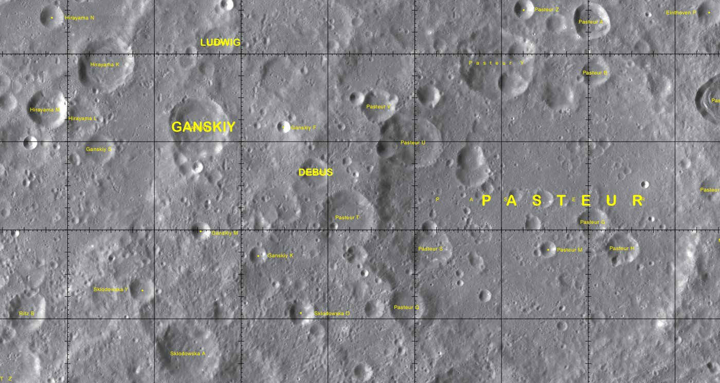 Cráter lunar Debus. Localización. (LRO)